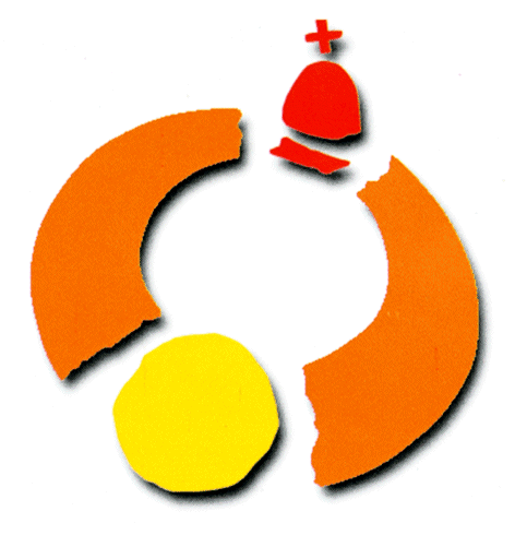 Giornata mondiale della gioventù 2000